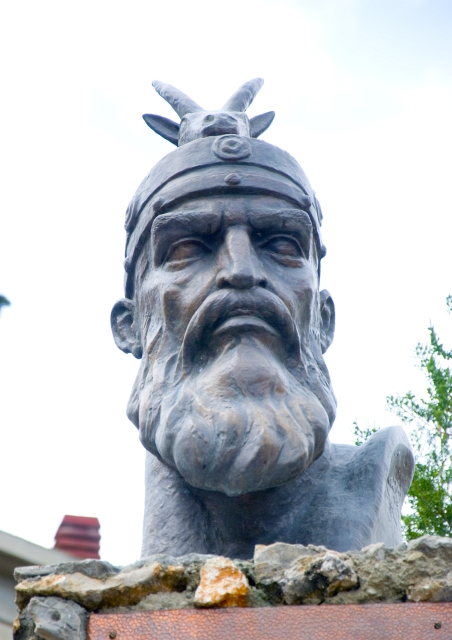 Il monumento a Scanderbeg Wikipedia: Civita; Parco Nazionale del Pollino. Wikipedia: Giorgio Castriota Scanderbeg; Arbëreshë